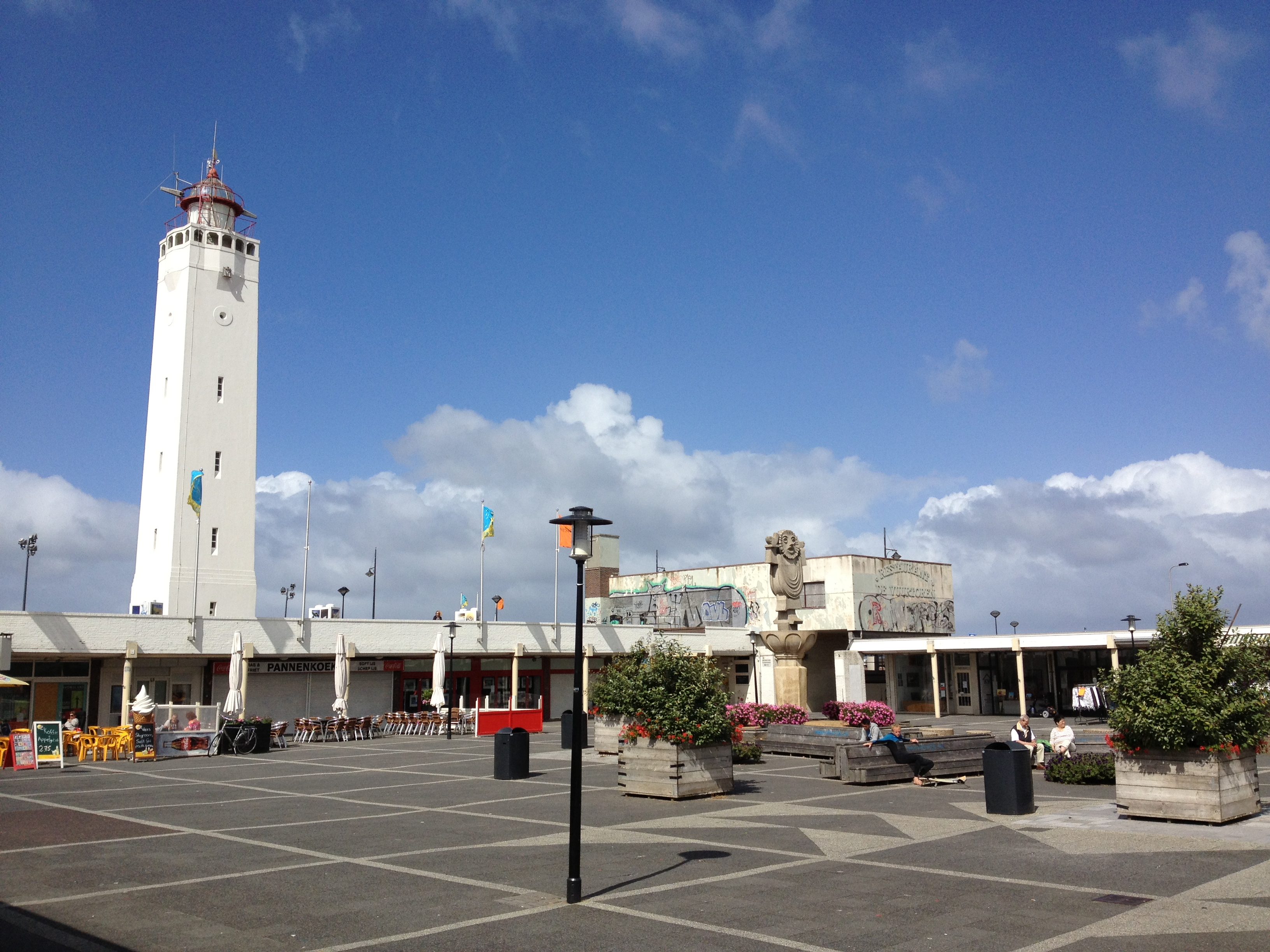 Vuurtorenplein, Noordwijk, South Holland